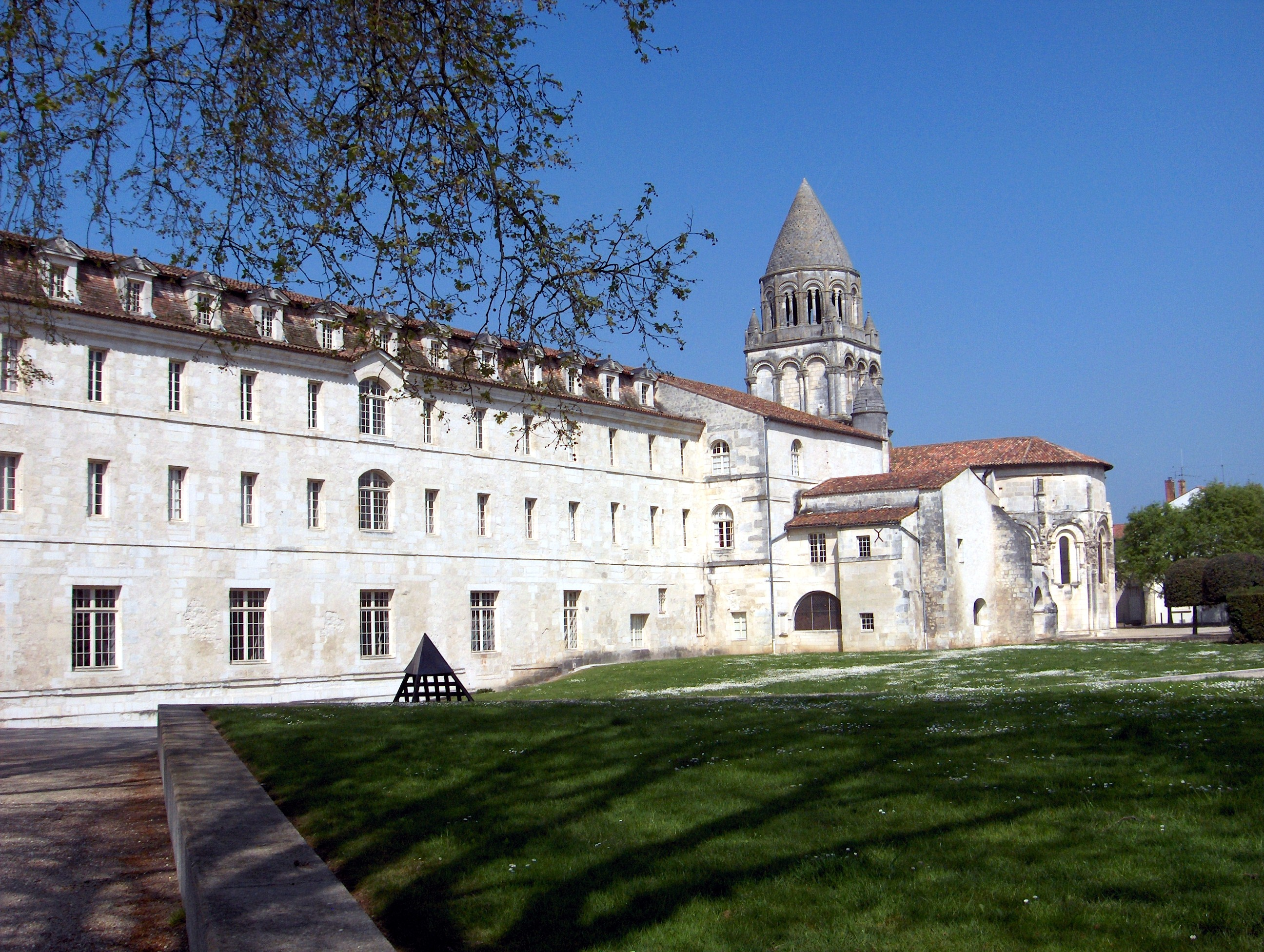 Abbaye aux Dames, Saintes, Charente-Maritime, France